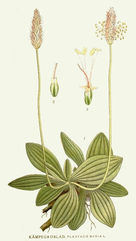 Original Description Kämpegroblad, Plantago media L.